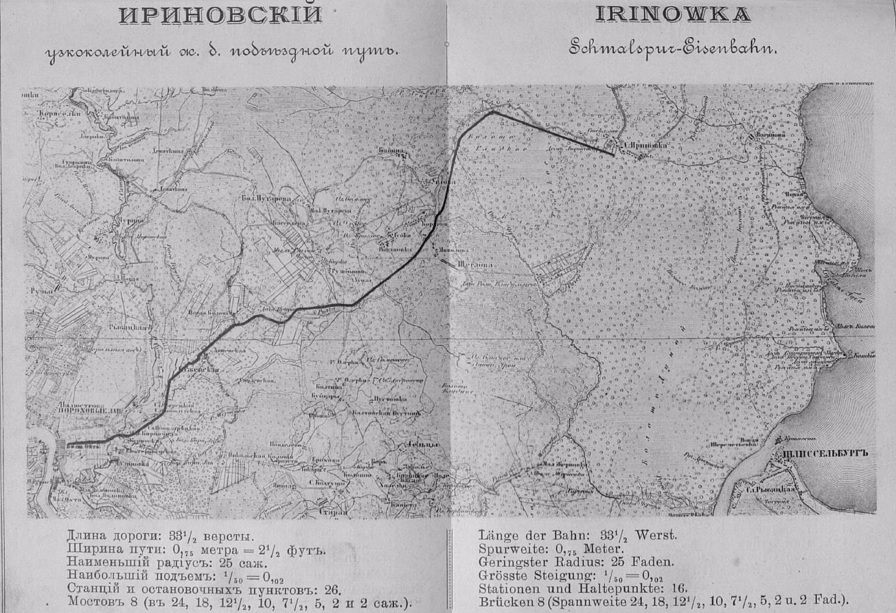 Карта Ириновской железной дороги